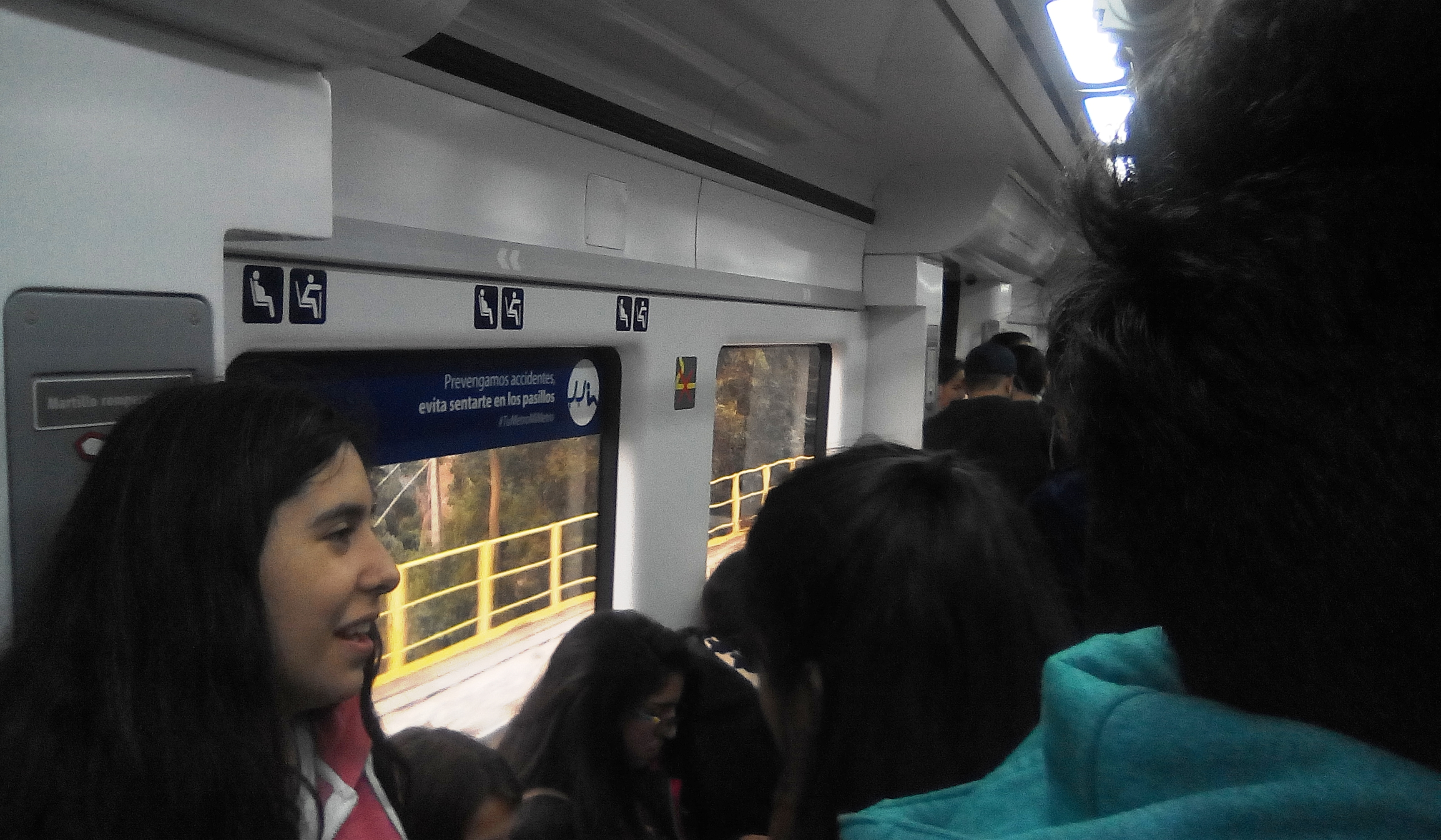 Tren del Metro Valparaíso sobre el puente Las Cucharas, en la región de Valparaíso, Chile.